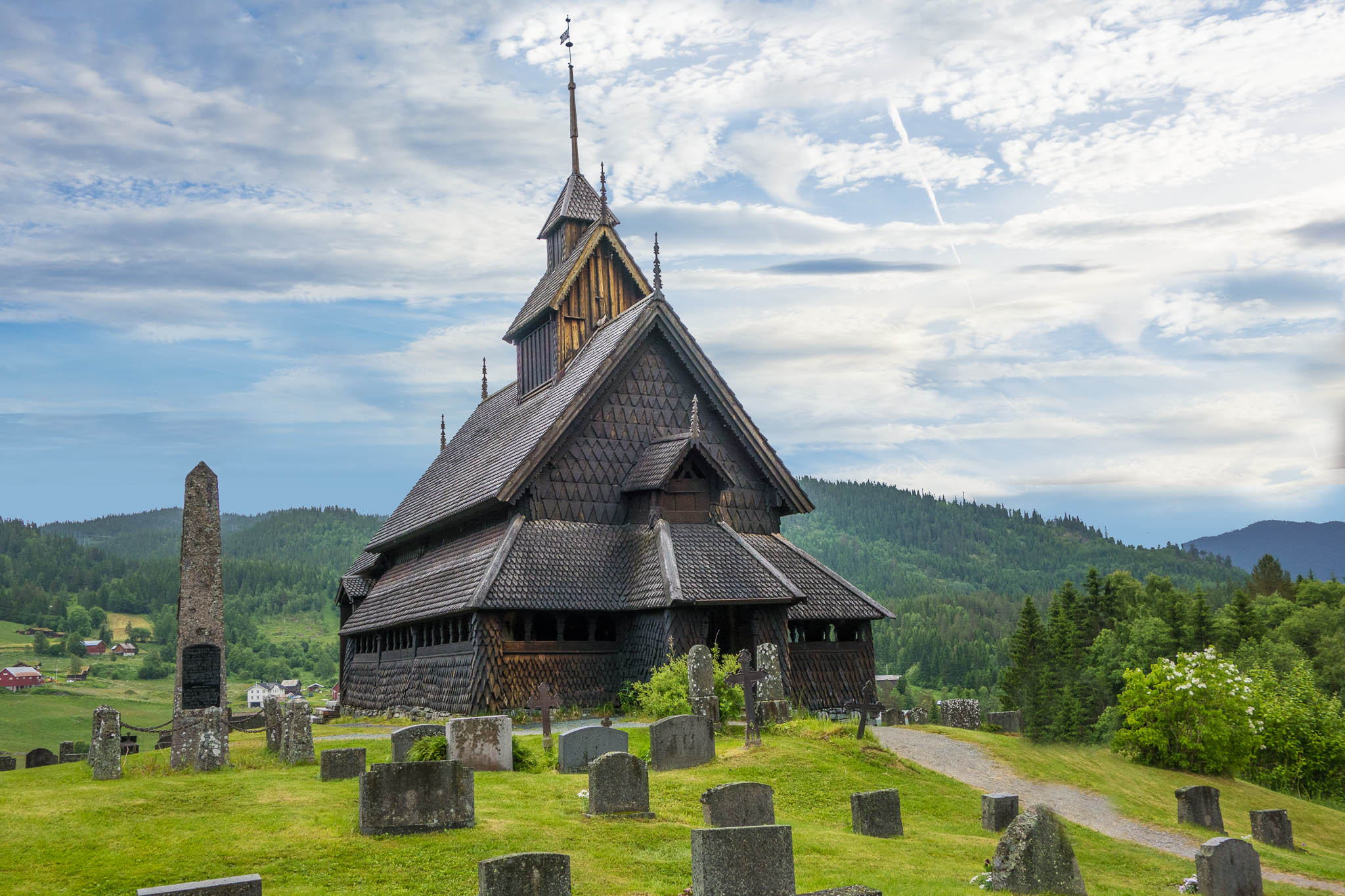 Eidsborg stavkirke i Tokke